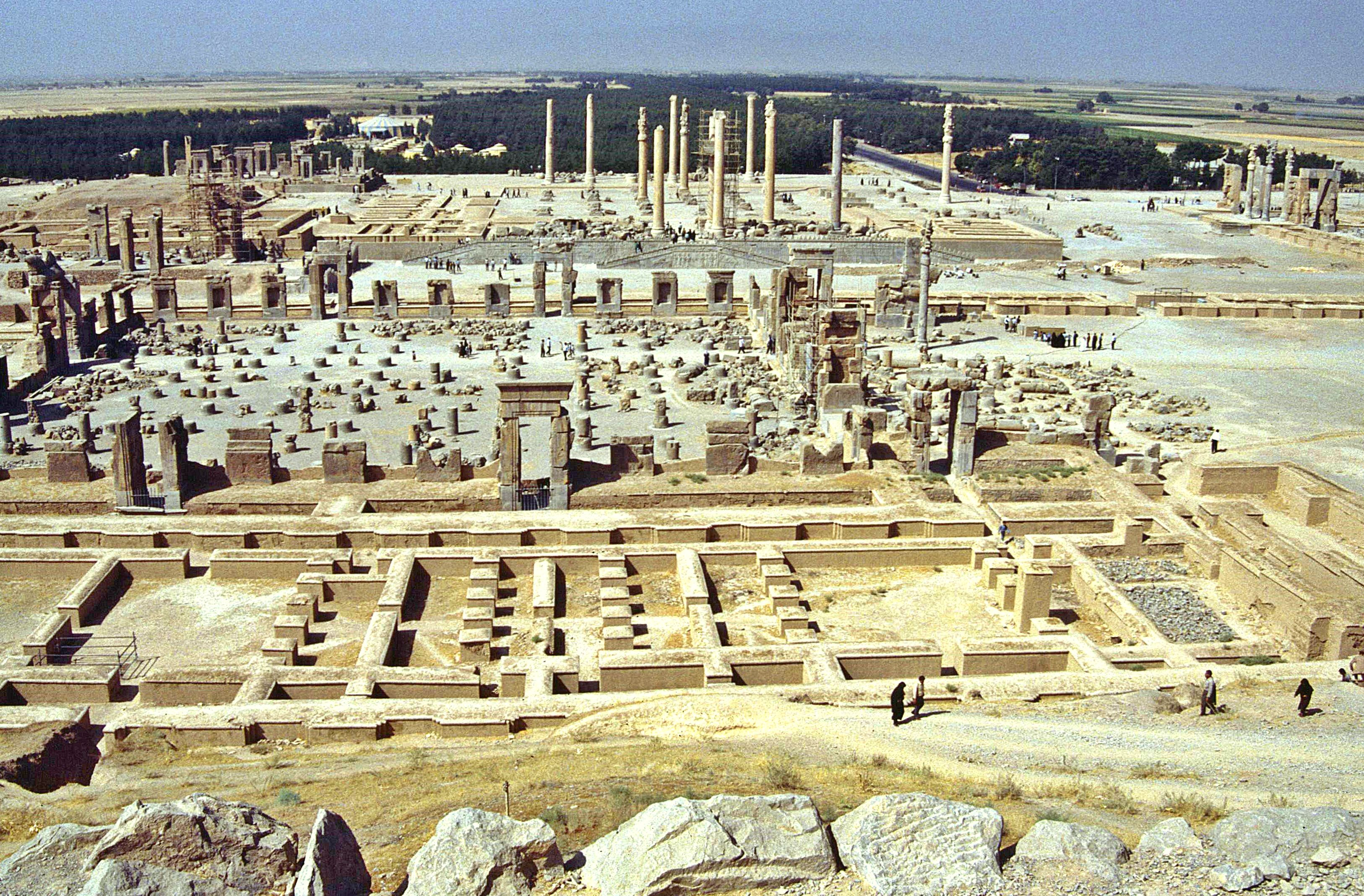 Persepolis, Übersicht